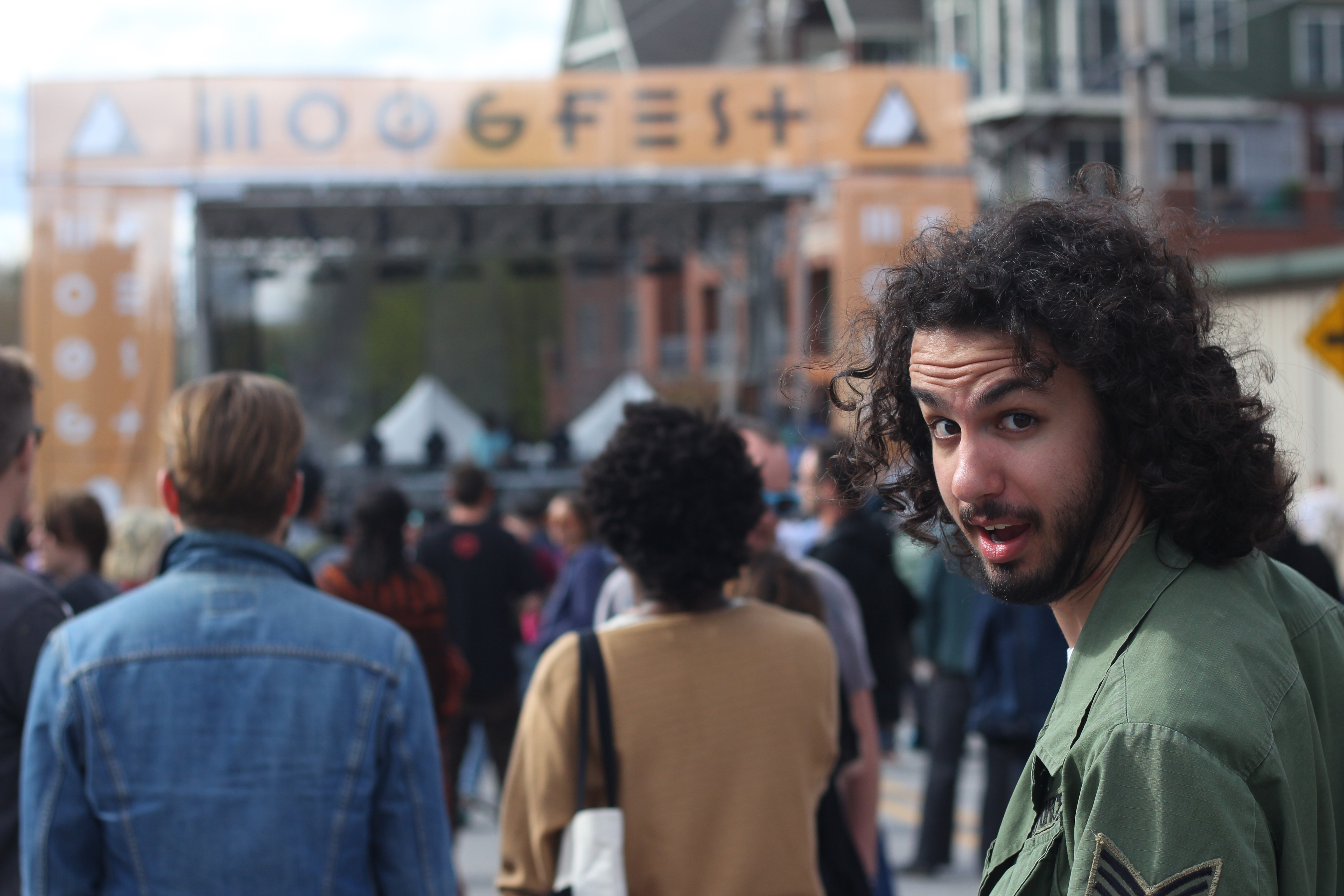 Woooooo!